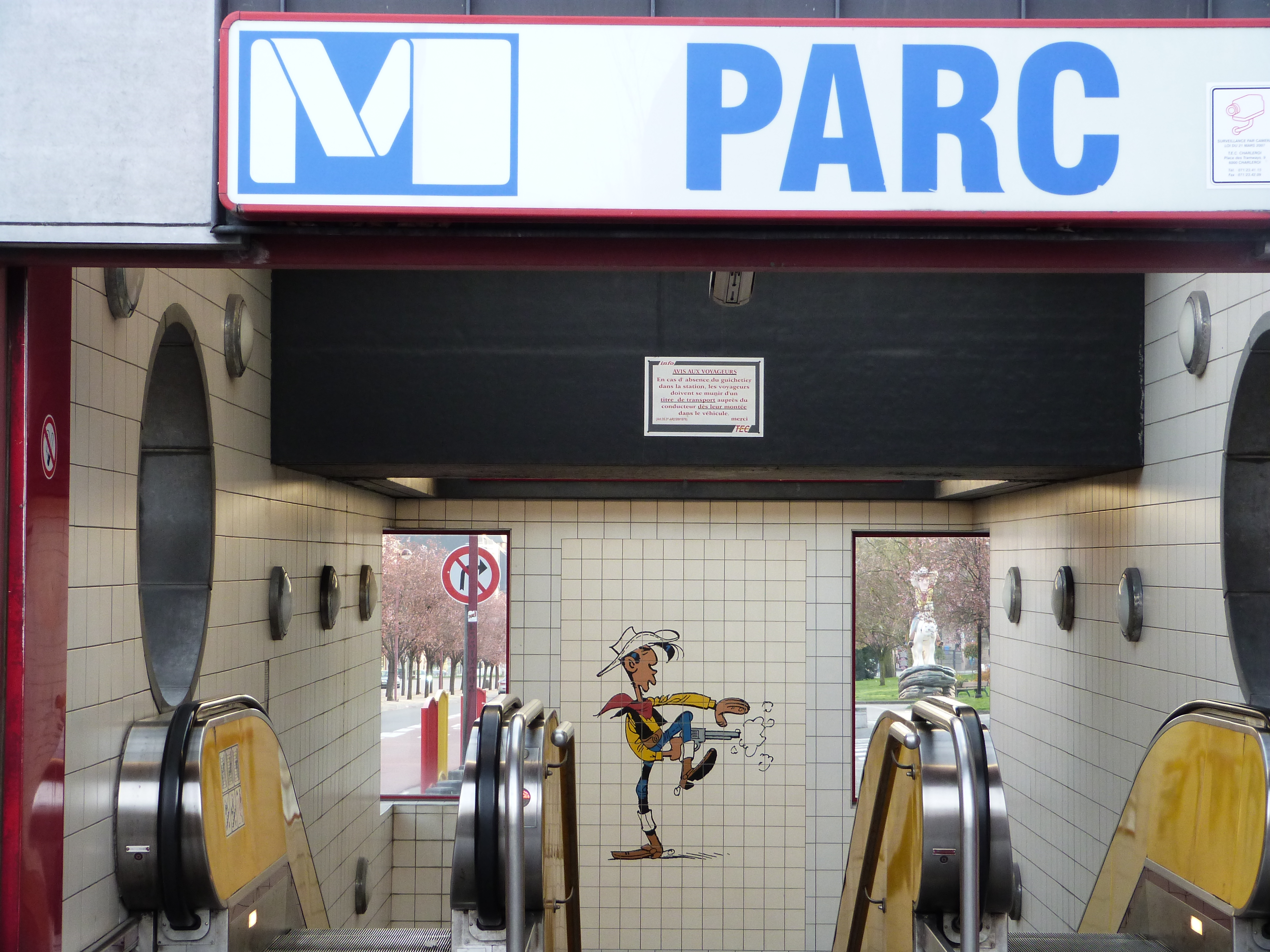 Charleroi - Metro